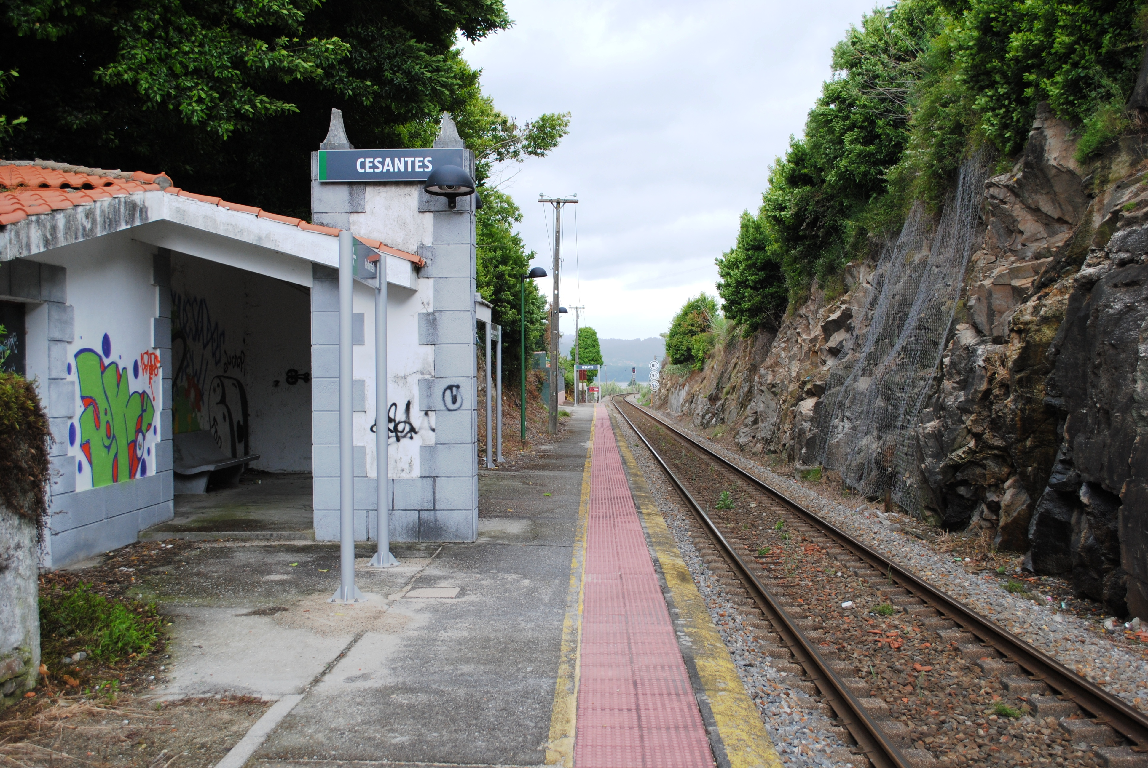 Vexa o título e as categorías.